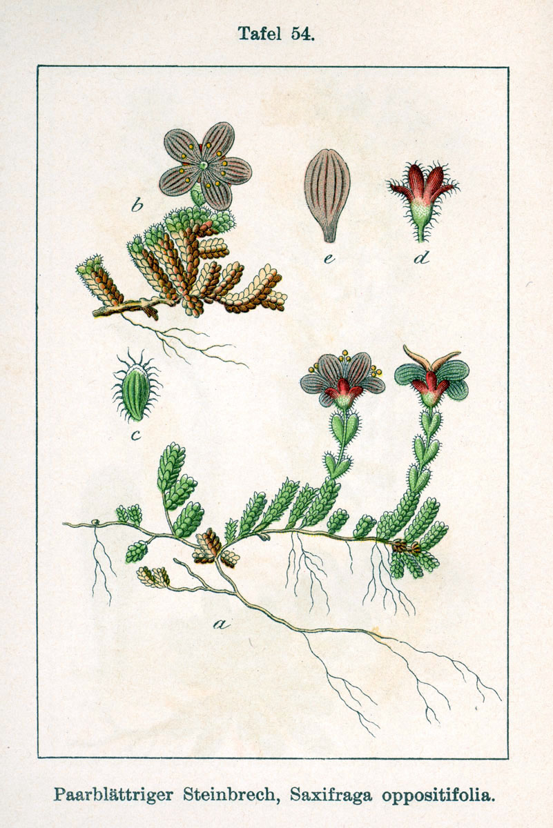 Saxifraga oppositifolia L. s. str. Original Description Paarblättriger Steinbrech, Saxifraga oppositifolia